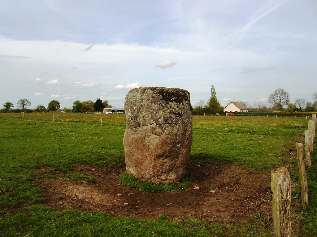 Le menhir de Vaumoisson ou "Pierre du Diable" à Jullouville (50)